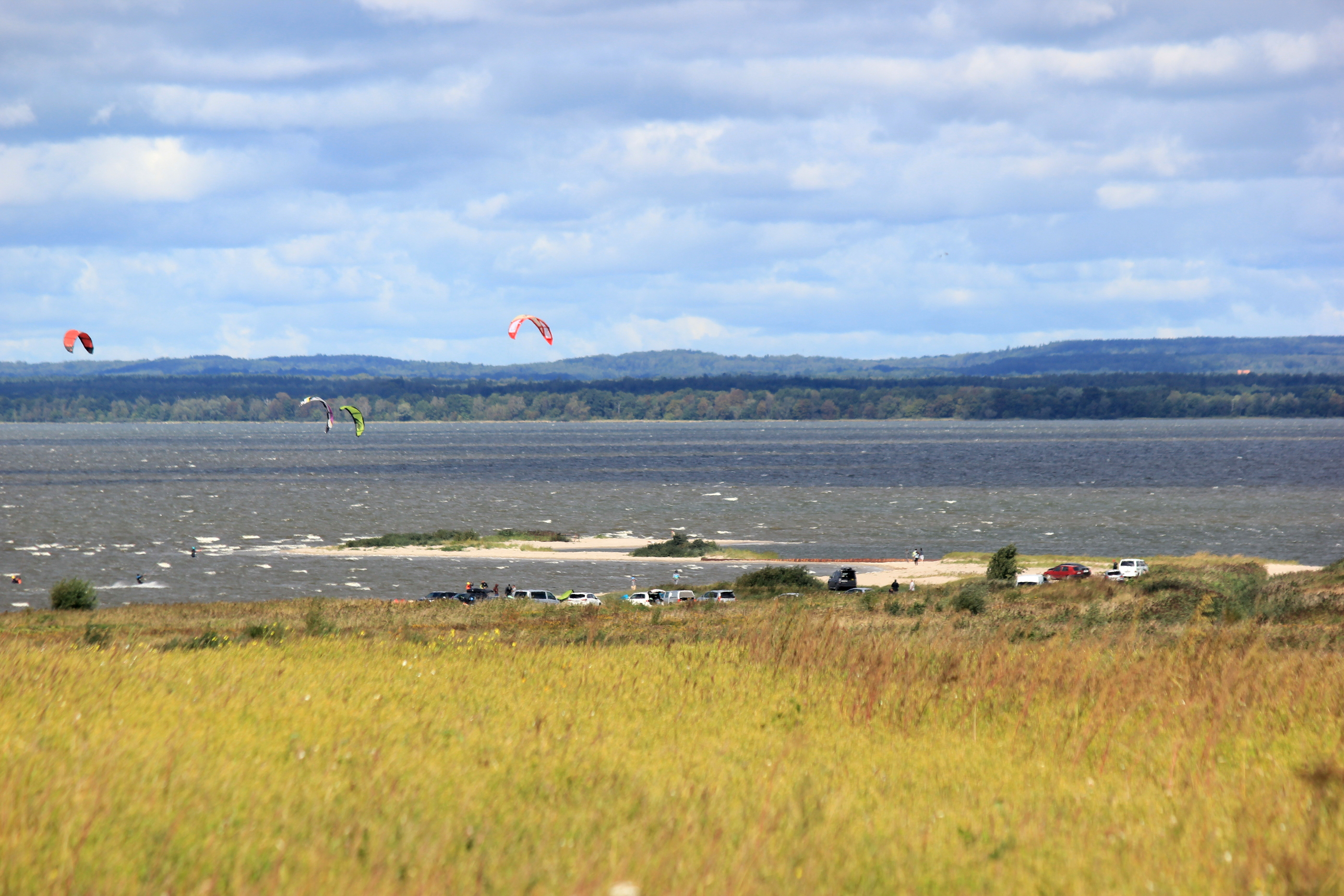 Blick auf das Frische Haff bei Kaliningrad (Königsberg), im Hintergrund das Alkgebirge.